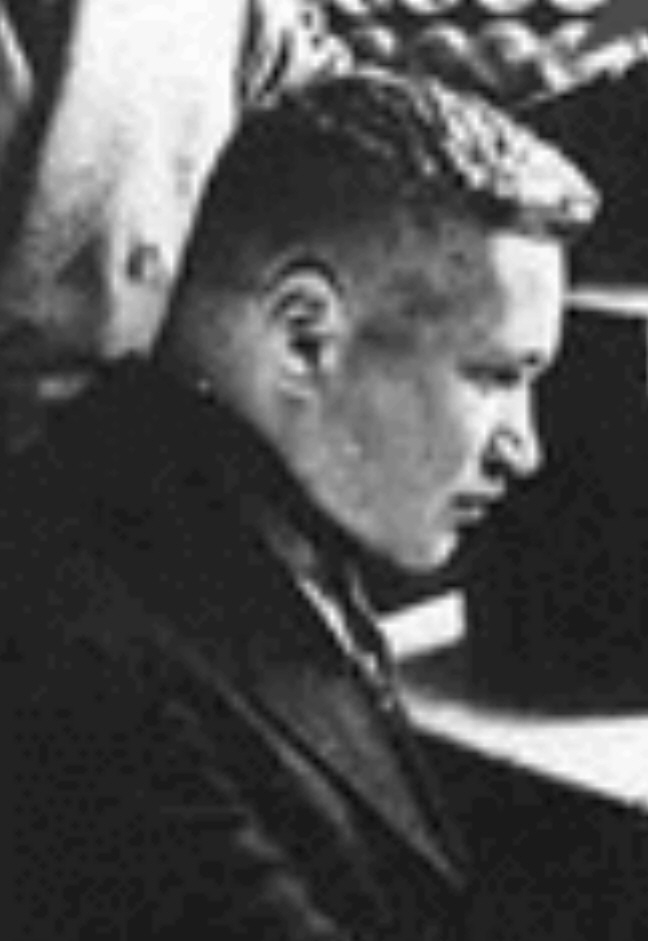 Lew Kowarski (* 10. Februarjul./ 23. Februar 1907greg. in Sankt Petersburg; † 30. Juli 1979 in Genf) Montreal, Manhattan-Projekt.